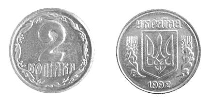 2 kopiyka Ukraine